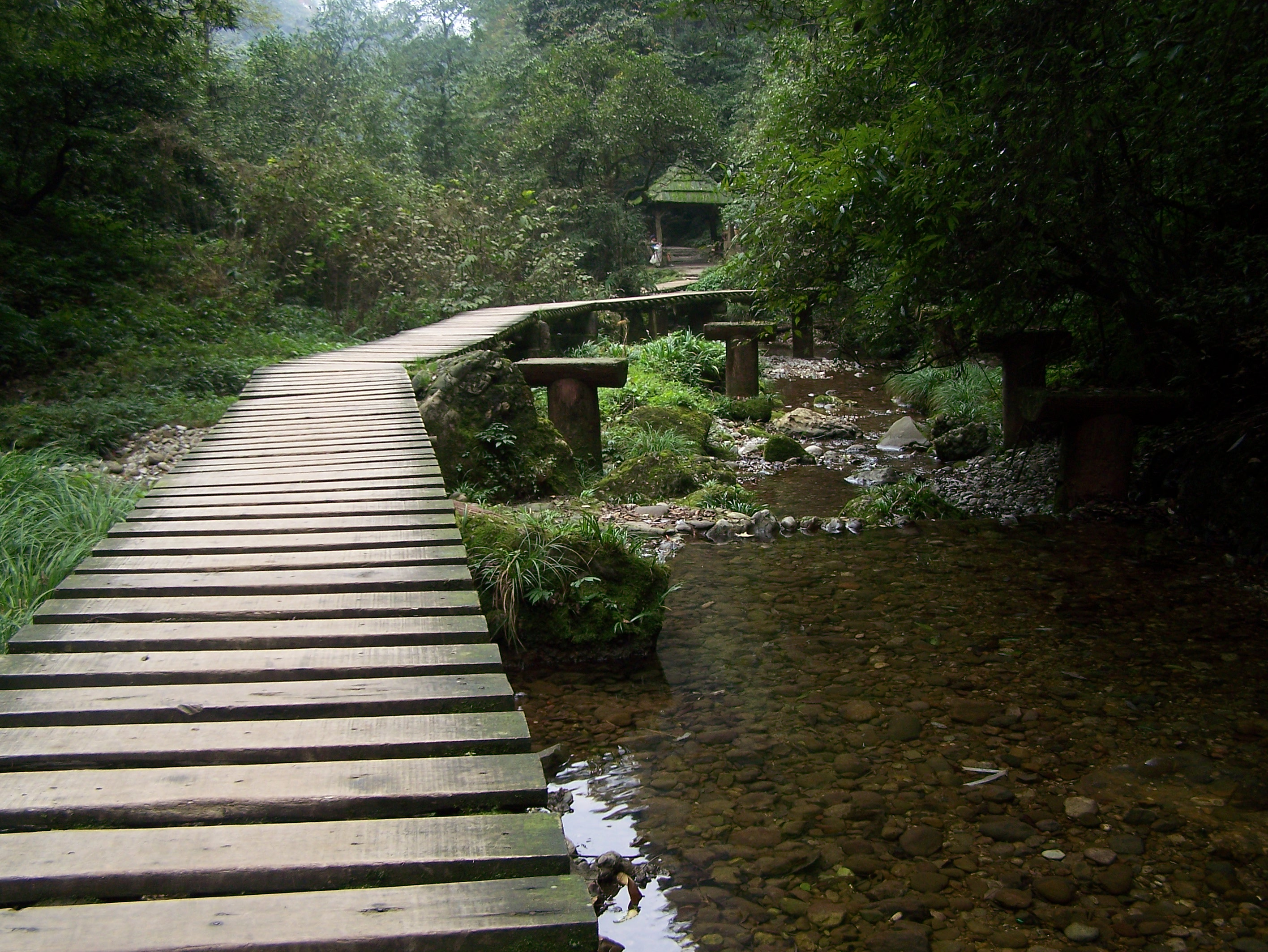 BaiZhangQiao